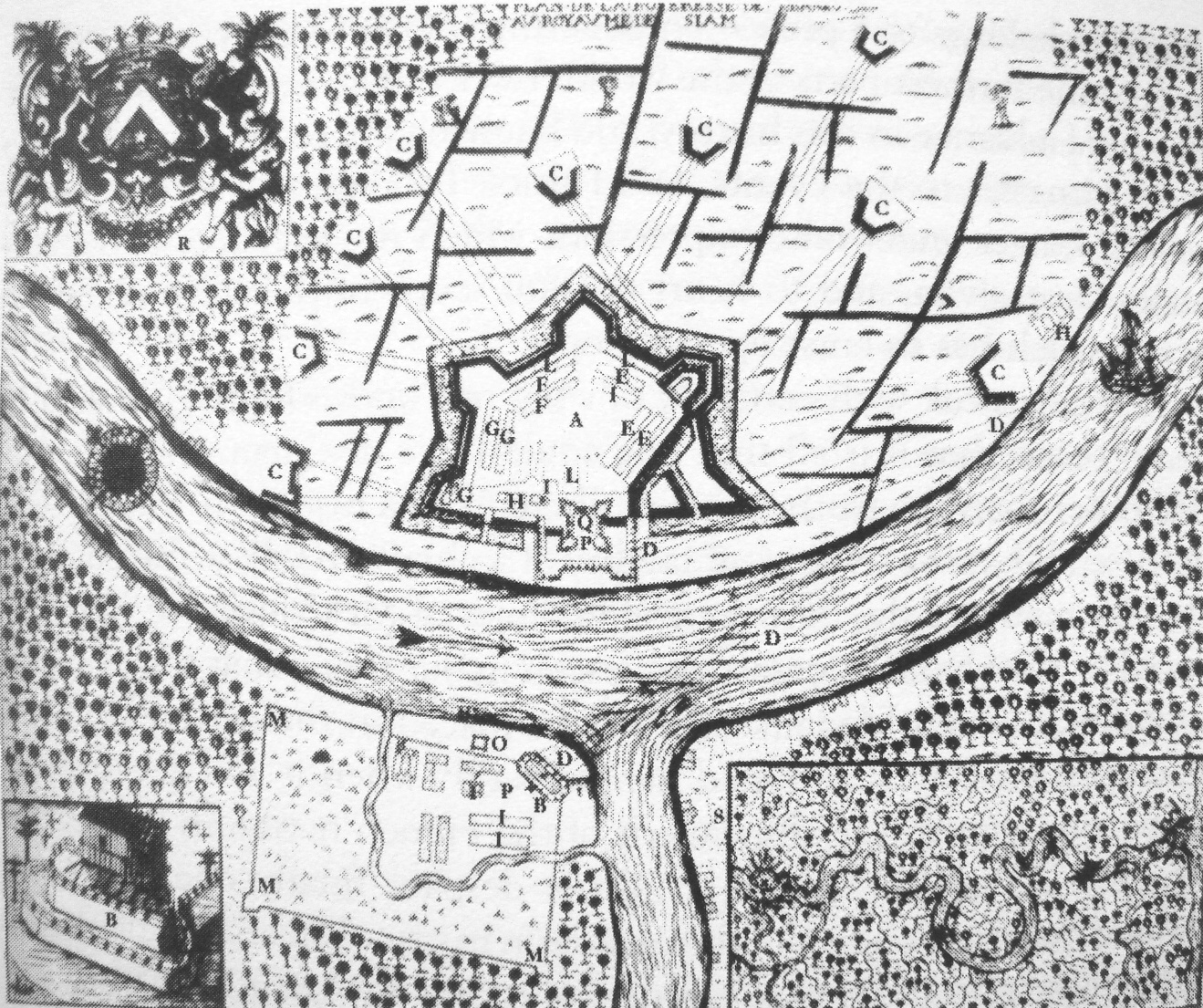 Siege of Bangkok (1688).